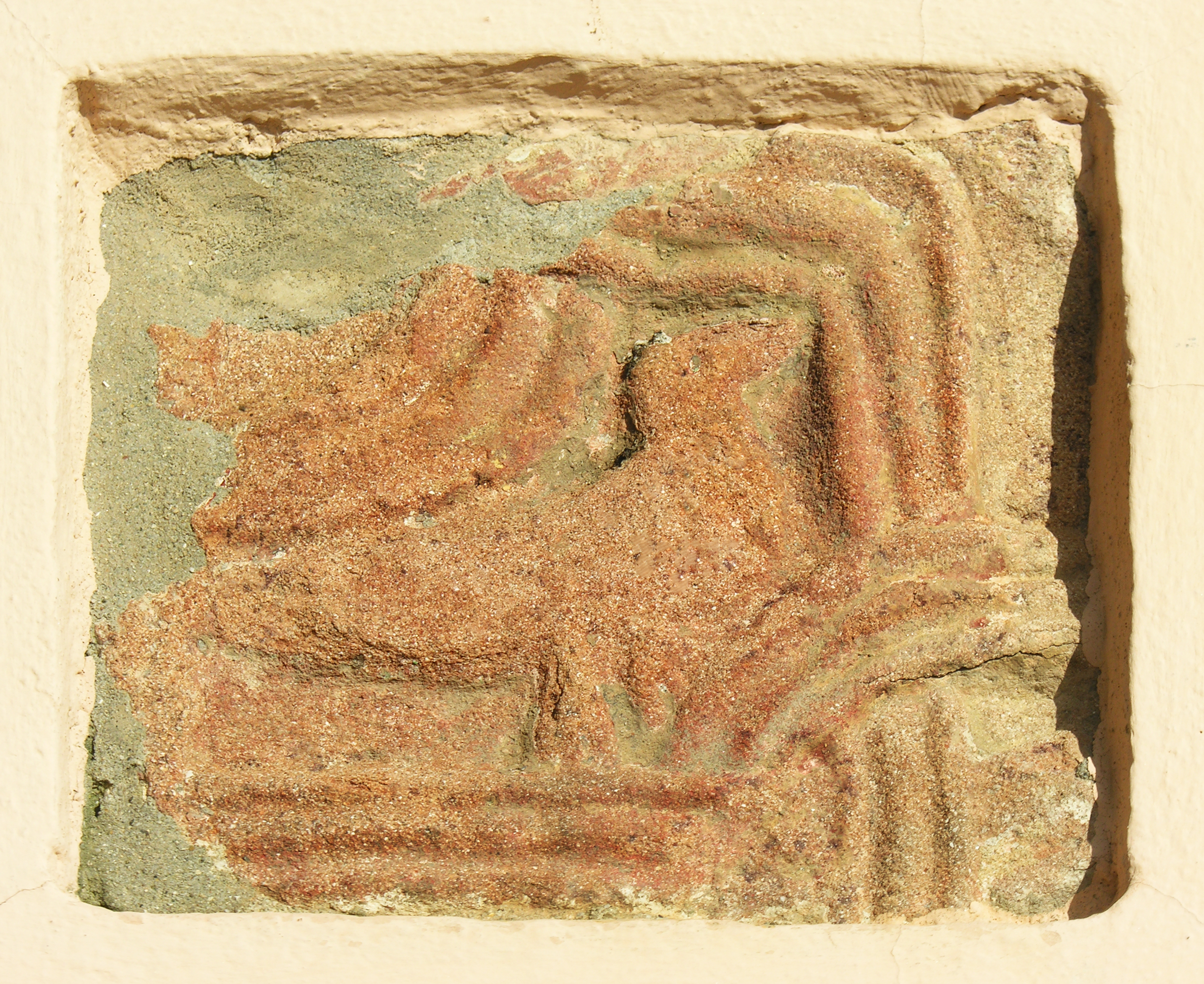 testimonianza archeologica del Parco Archeologico La Torre